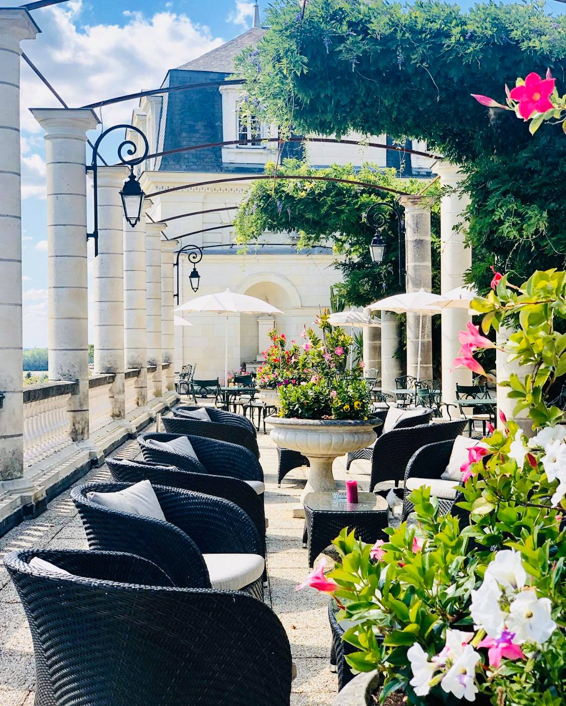 Terrasse à l'Italienne